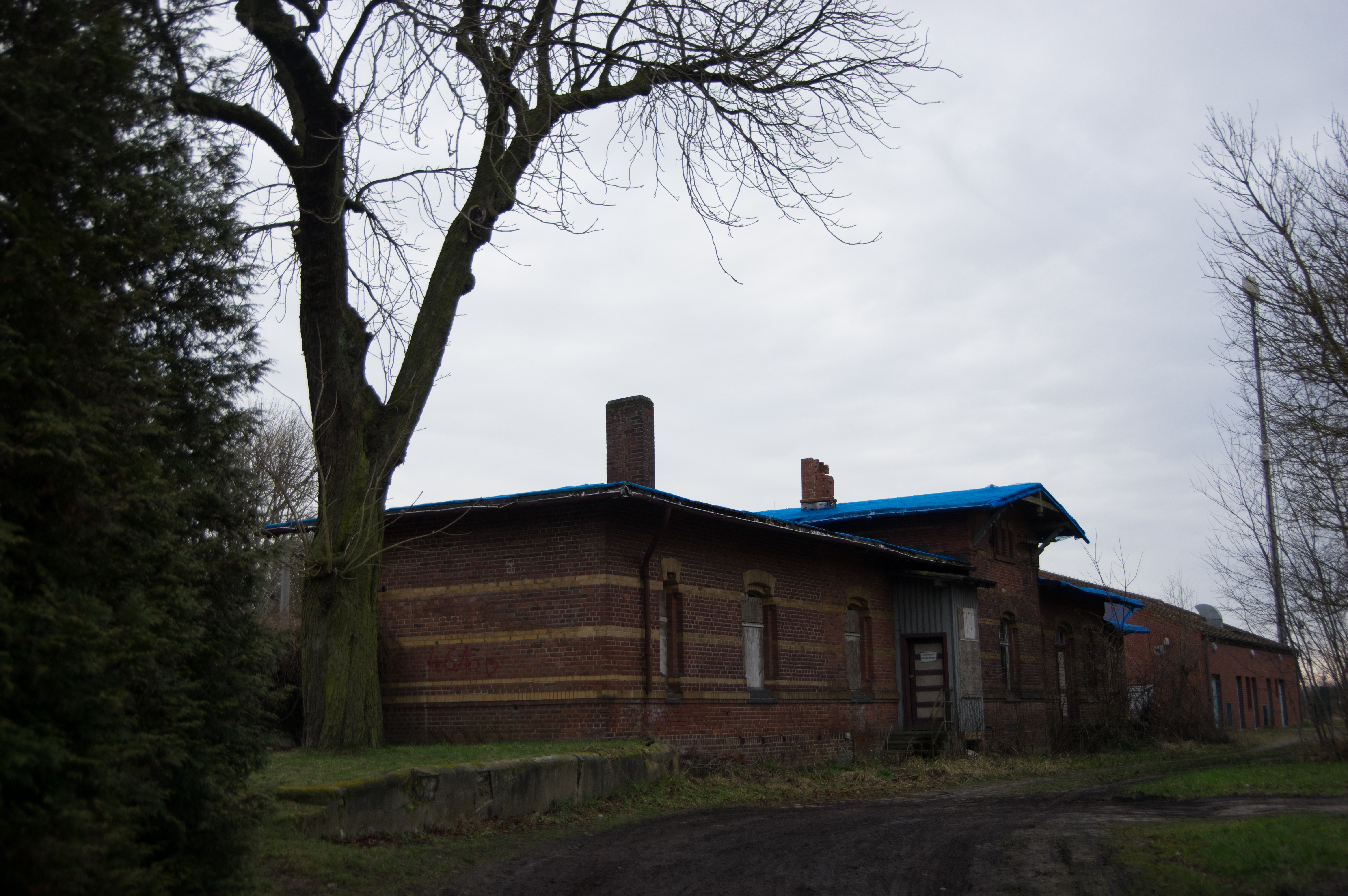 Gardelegen, Ortsteil Miesterhorst. Der Bahnhof der Siedlung.